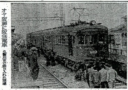 阪神久寿川駅まで暴走した阪急今津線の電車(阪急600形電車)。